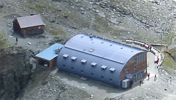 Die Stuedlhuette von oben.